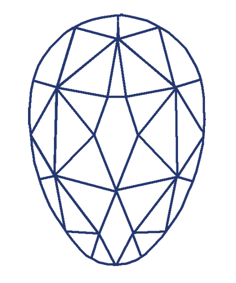 Relevé des 51 facettes de la taille en rose du Sancy